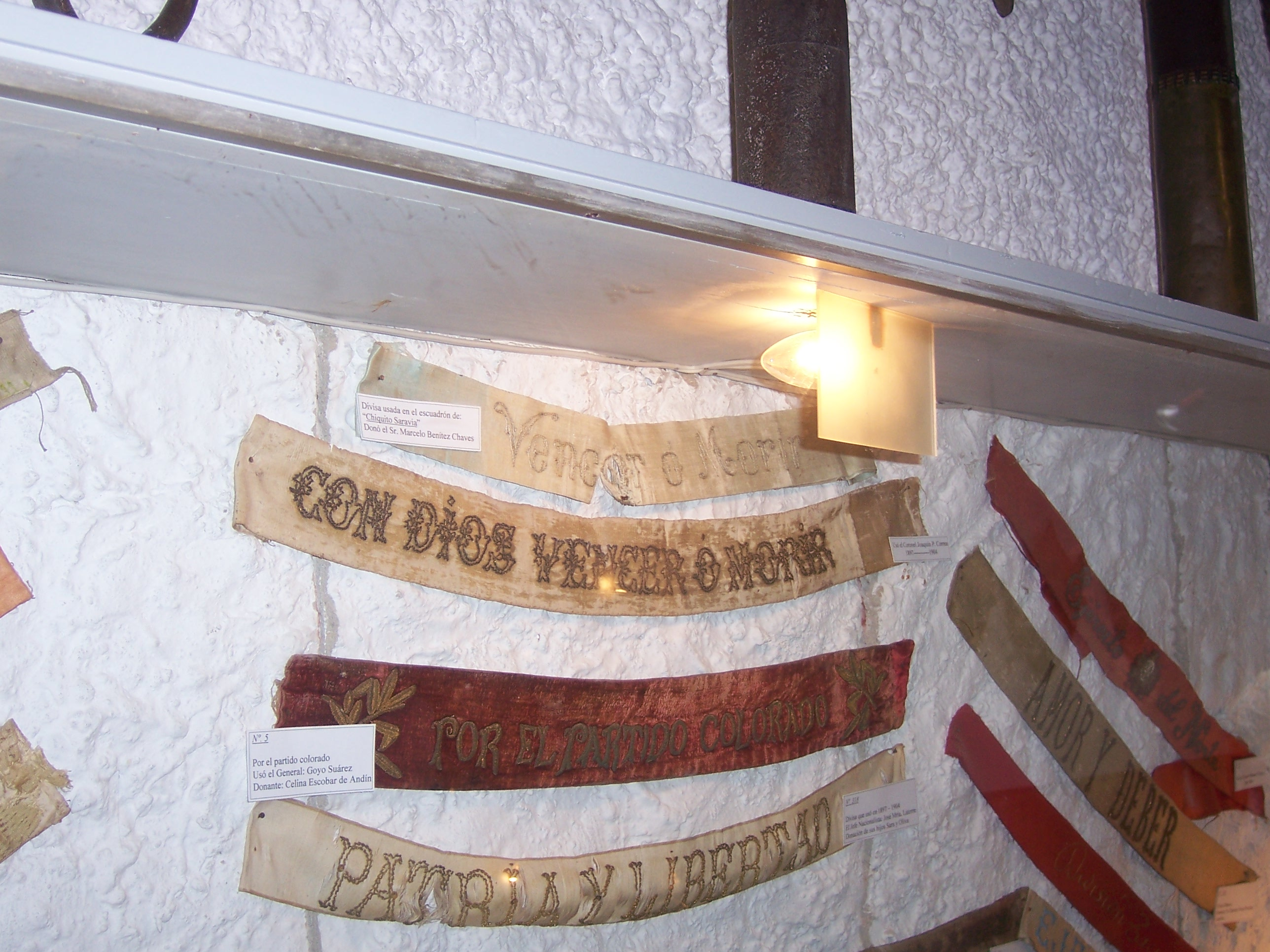 Algunas de las divisas partidarias que se utilizaron en Uruguay. La imagen corresponde al acervo depositado en el Museo del Indio Washington Escobar, sito en la ciudad de Tacuarembó, capital del departamento del mismo nombre.